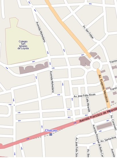 Mapa de ubicación del Colegio San Ignacio de Loyola, ubicado frente al Centro San Ignacio: 10°49′76″N 66°8′56″O